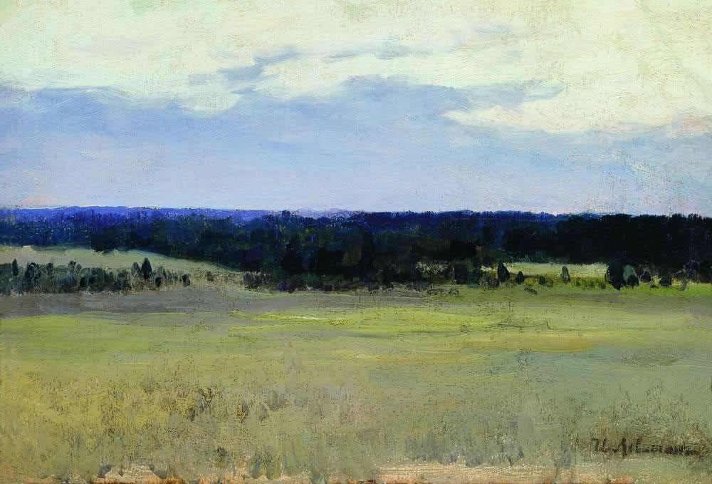 Полдень